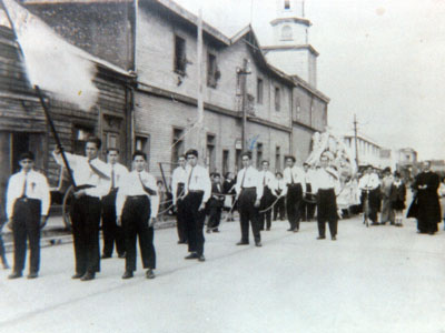 esunafoto